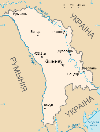 Карта МалдавііБеларуская (тарашкевіца): Мапа Малдовы